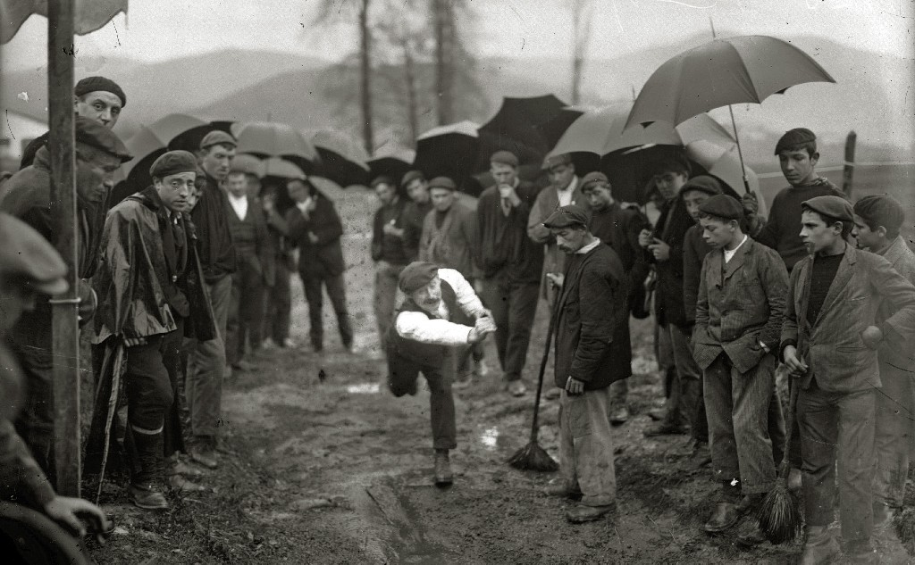 Título original: Partida de bolos en el campo de golf de Lasarte (6/10) Localización: Lasarte-Oria (Guipúzcoa)